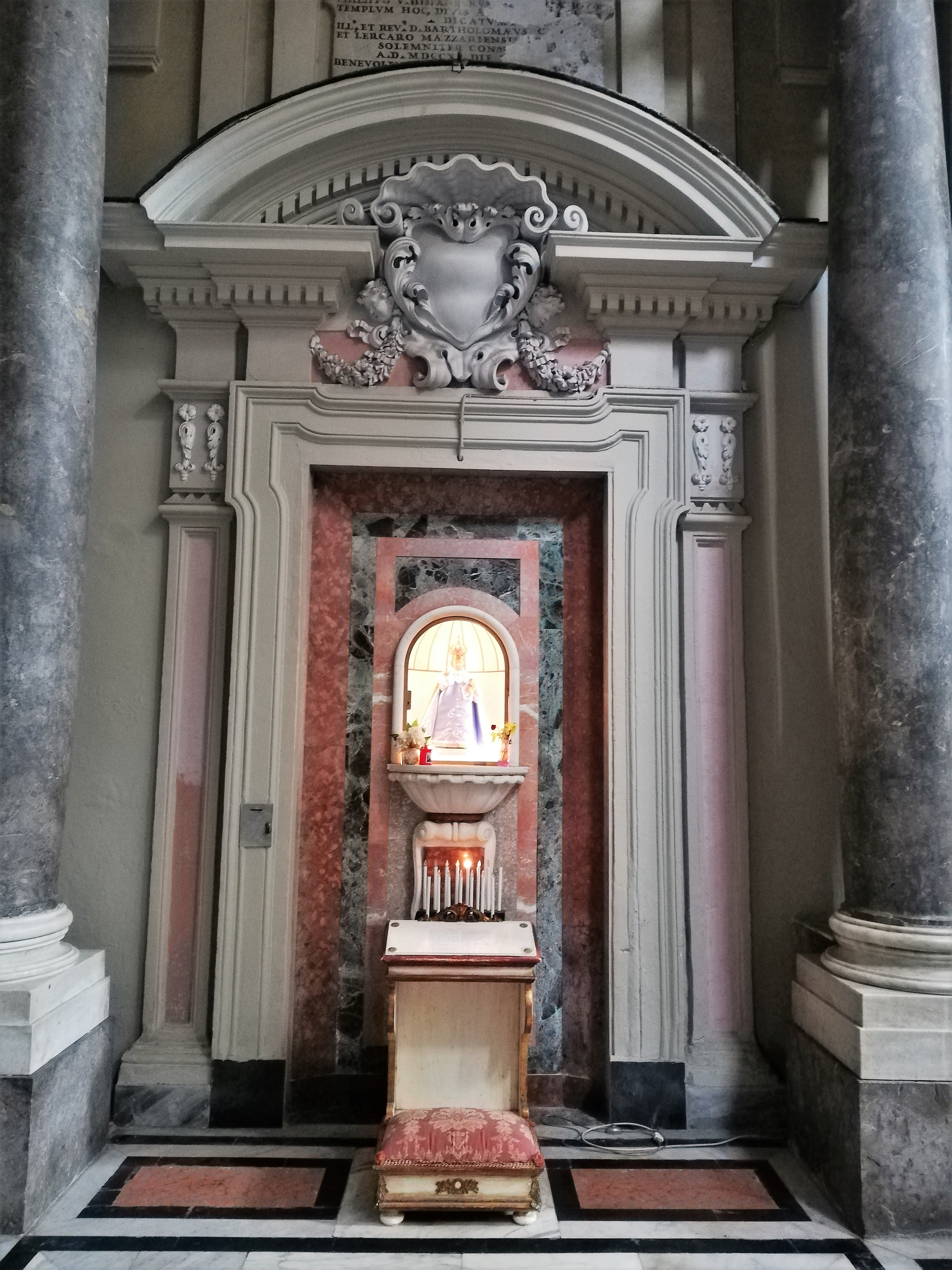 Ingresso.